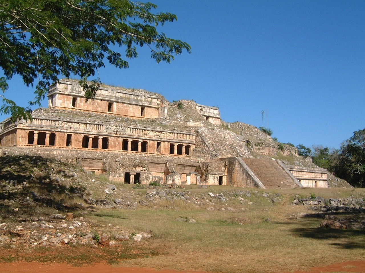 Sayil Yucatán México